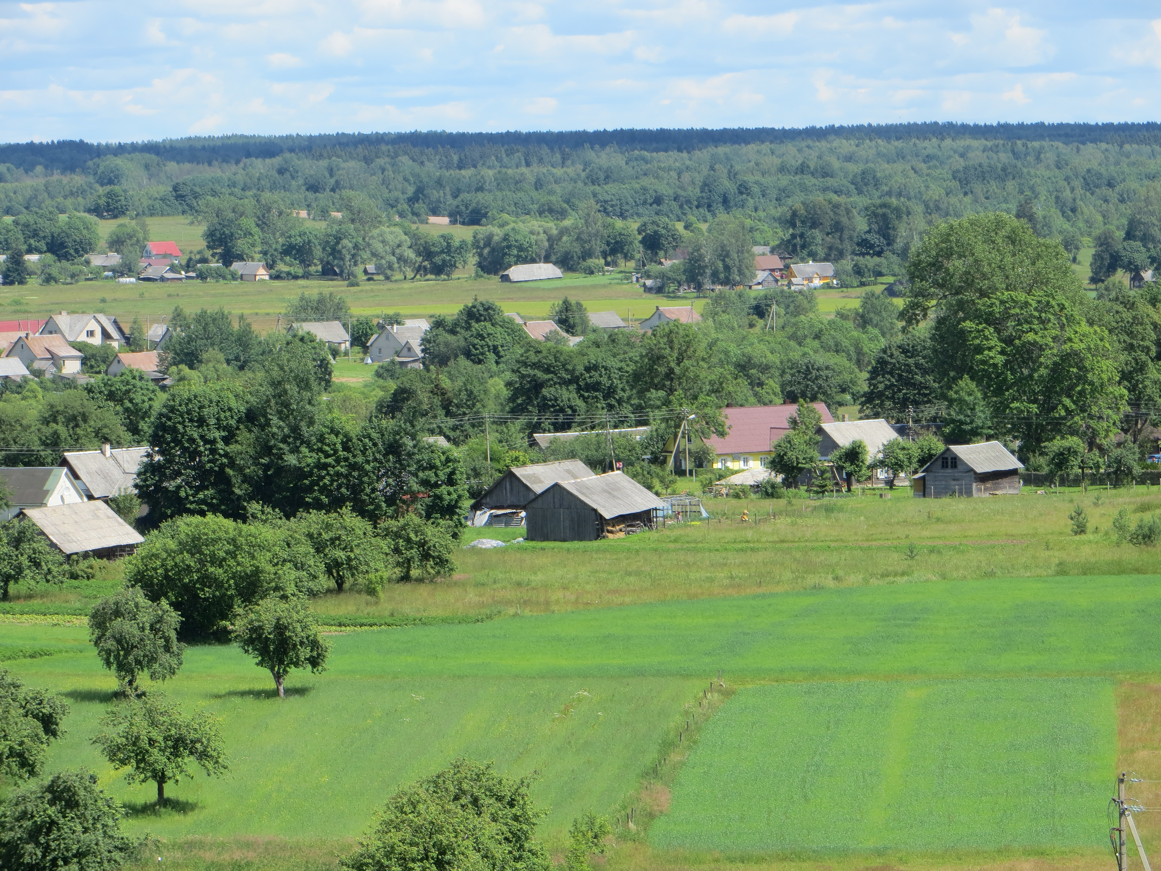 Naujas Strūnaitis, Lithuania